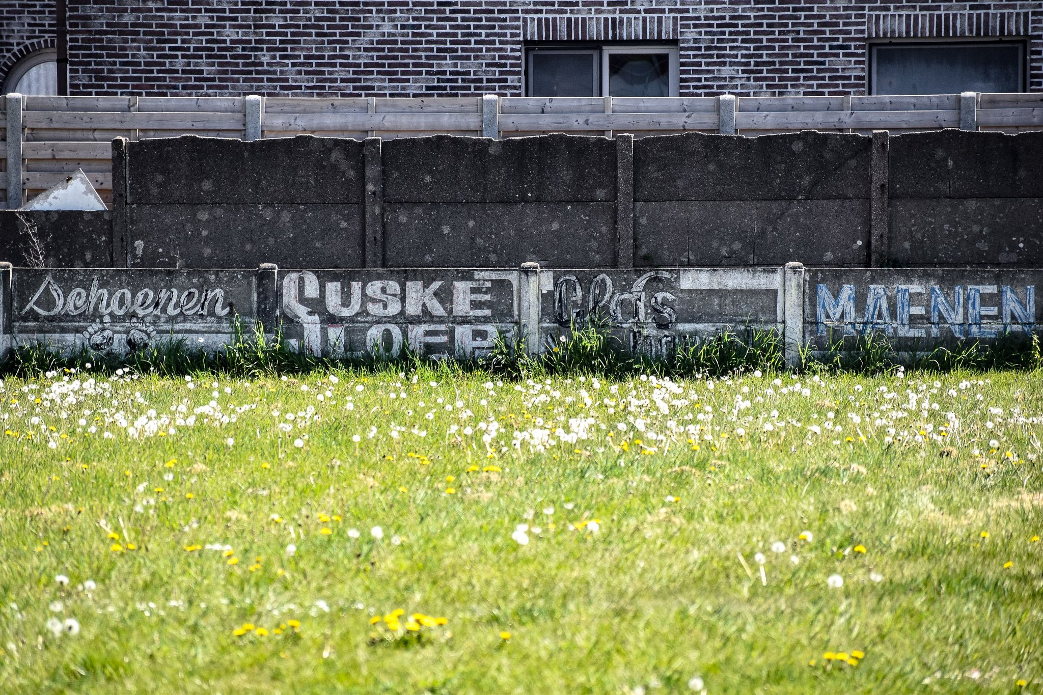 Verbroedering